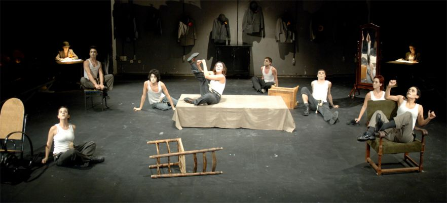 Gaspar, representación en la RESAD